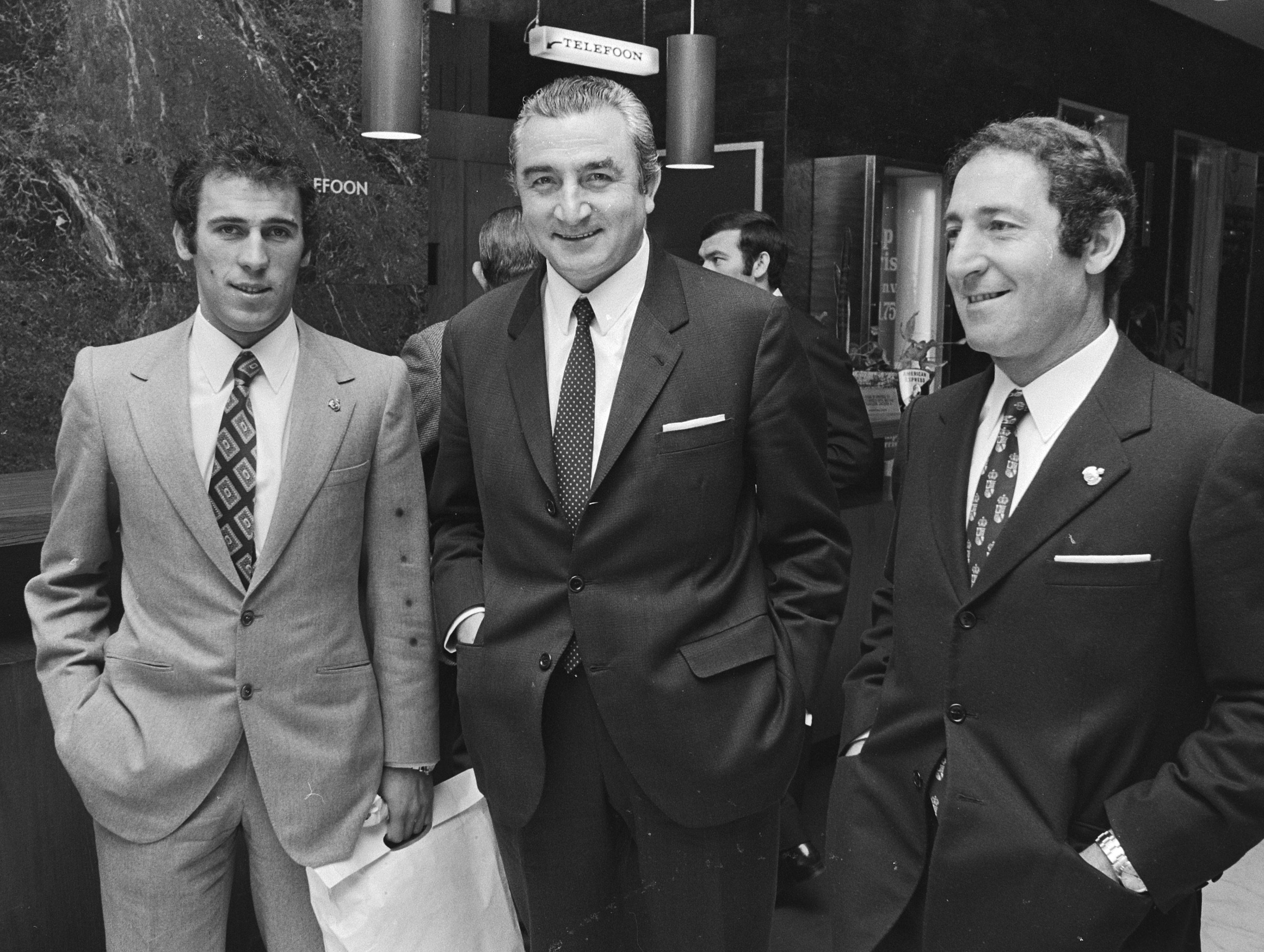 Real Madrid bezoekt het Evoluon in Eindhoven